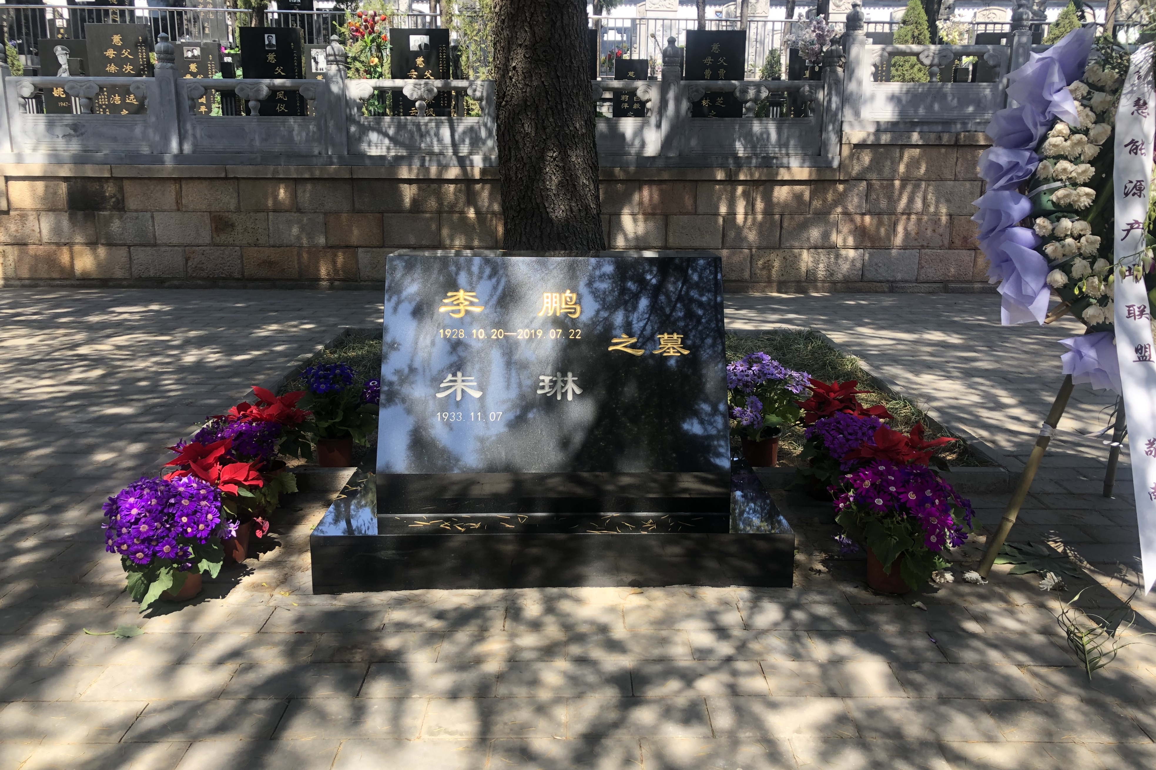 李鹏之墓，八宝山革命公墓内。李鹏为中华人民共和国第4任总理。